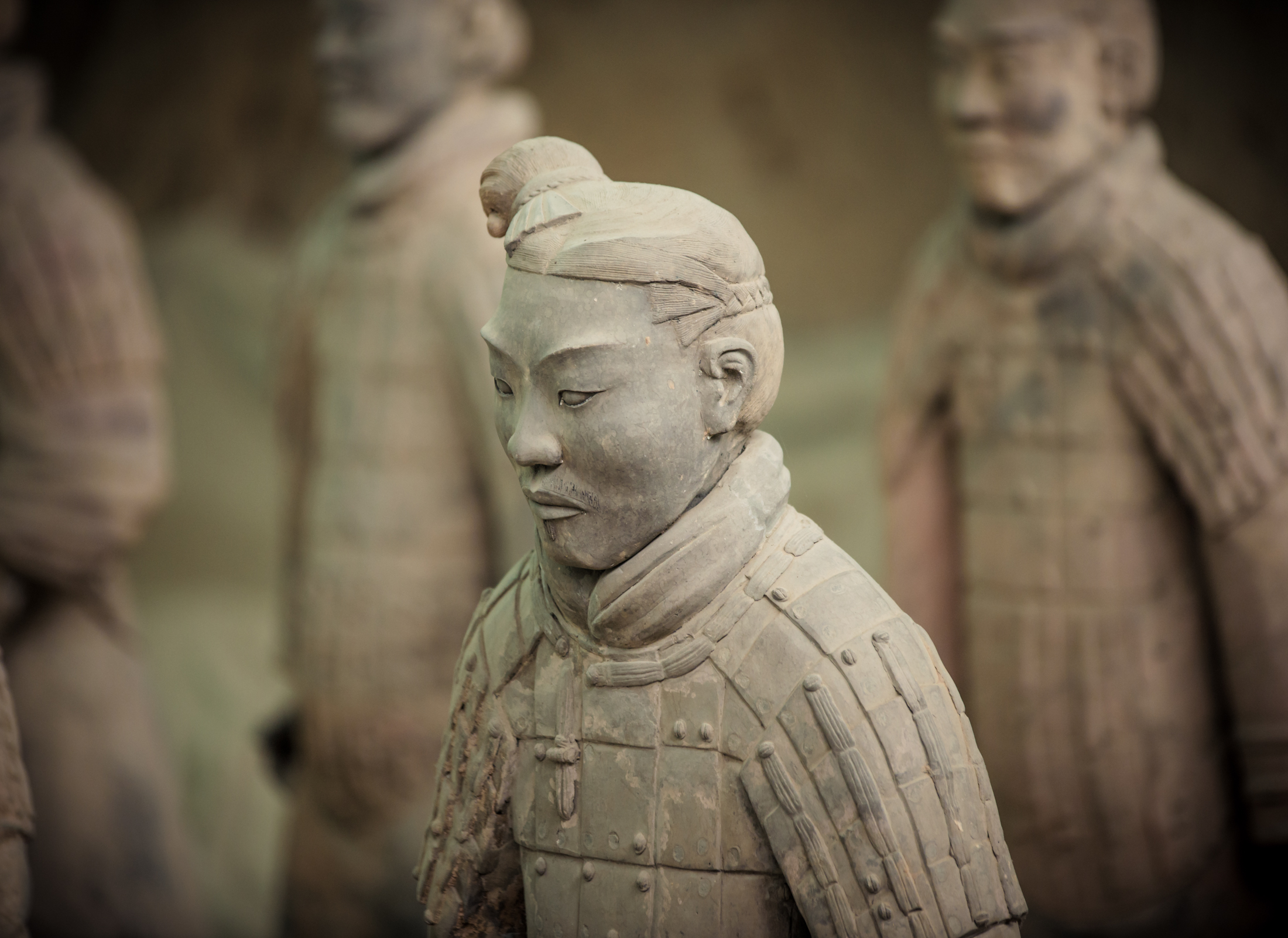 Guerreros de Terracota, Xi'an